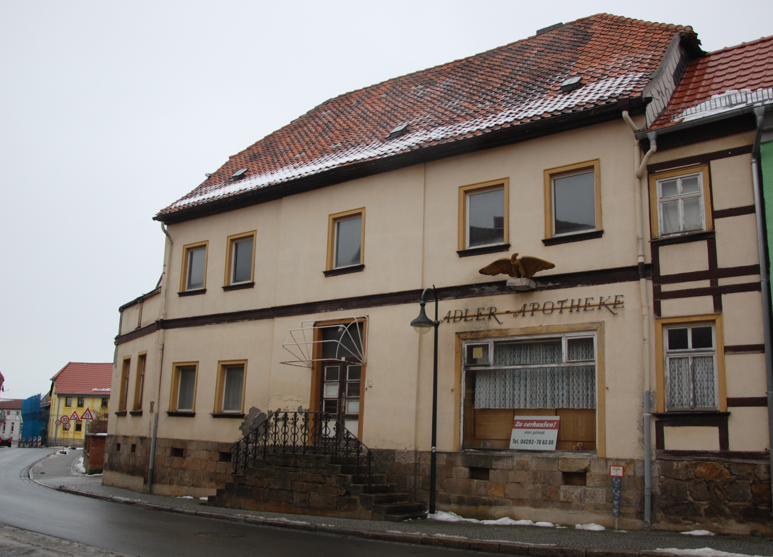 Haus Marktstraße 7 in Gernrode